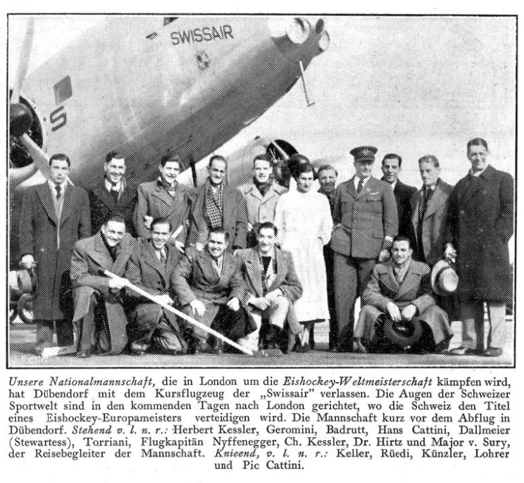 Schweizer Nationalmannschaft, Eishockey-Weltmeisterschaft 1937 in London (Bronce)